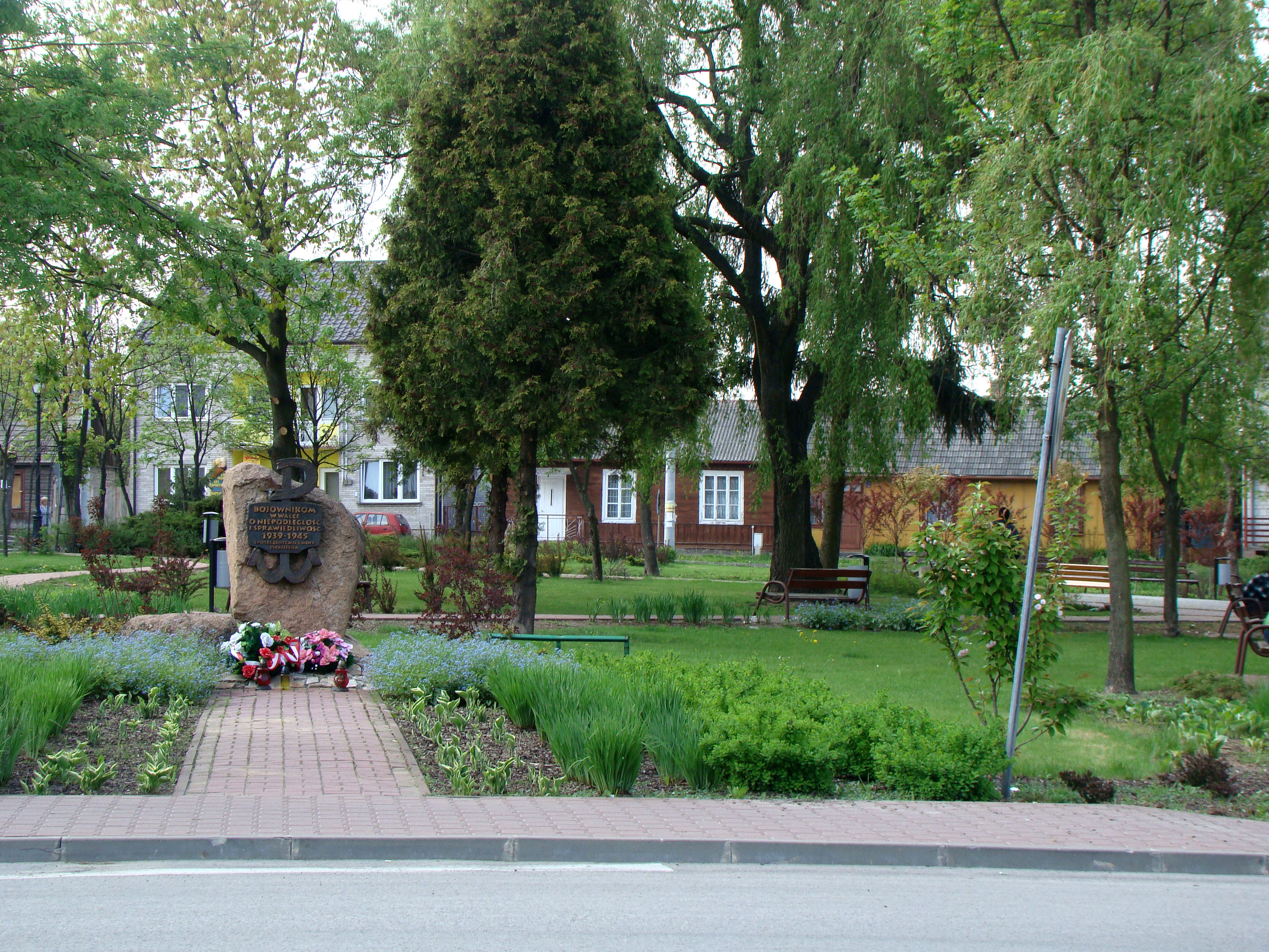 Iwaniska